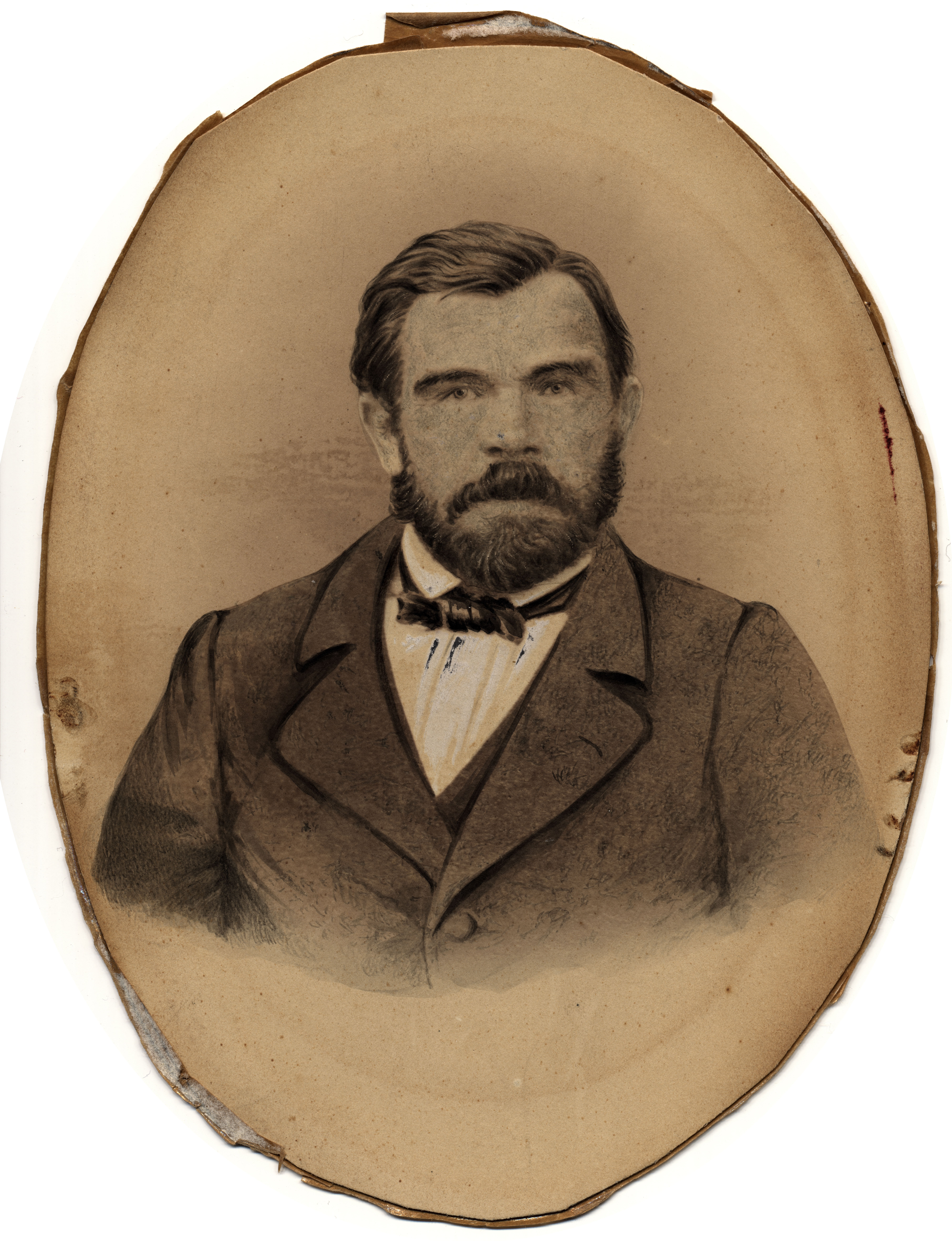 Laut rückseitiger Beschriftung Prof. Dr. Bernhard Joseph Féaux (1821-1879) Privatbesitz